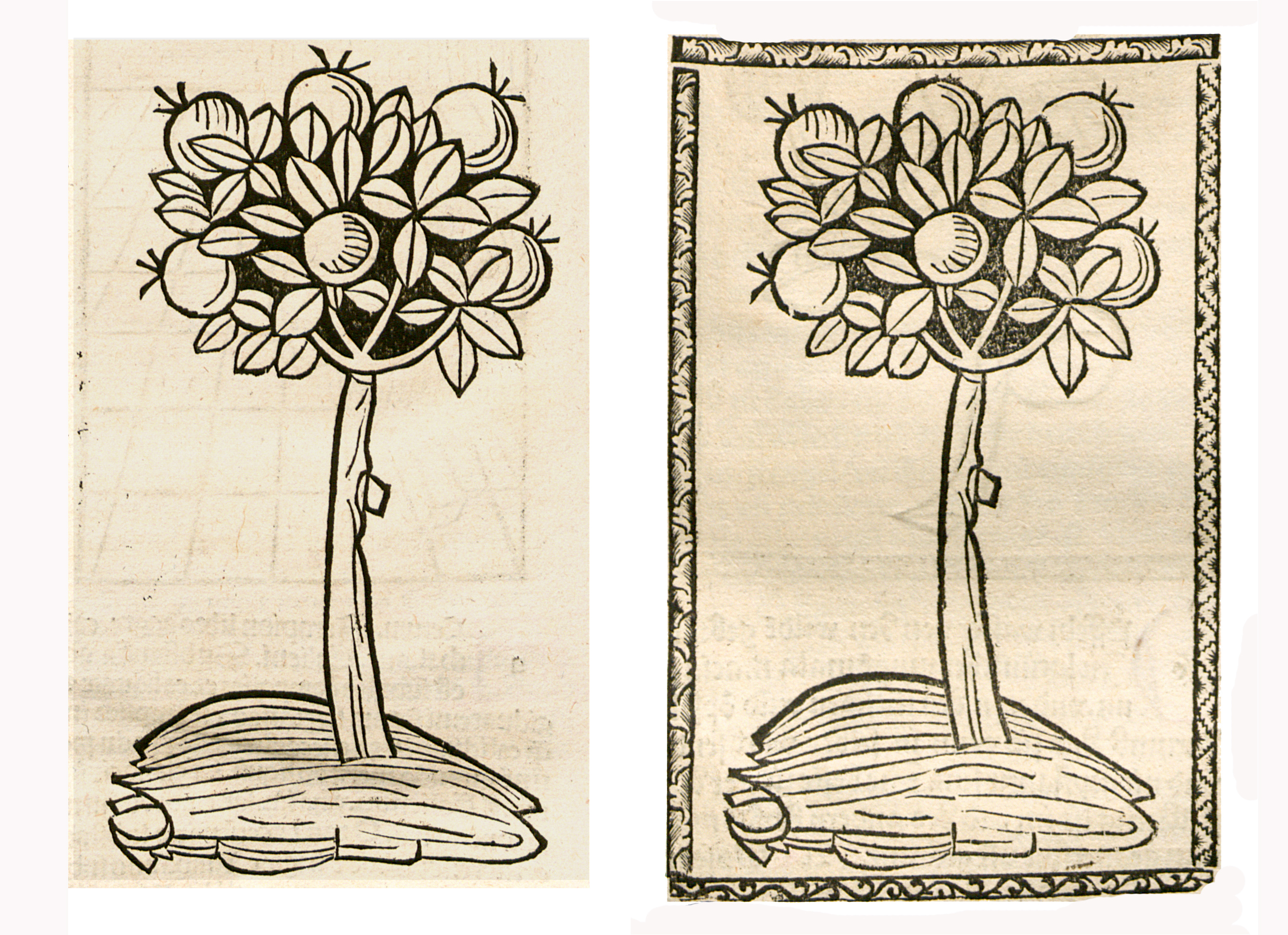 Abbildung von: Öpfel, Zahme (Malus domestica)